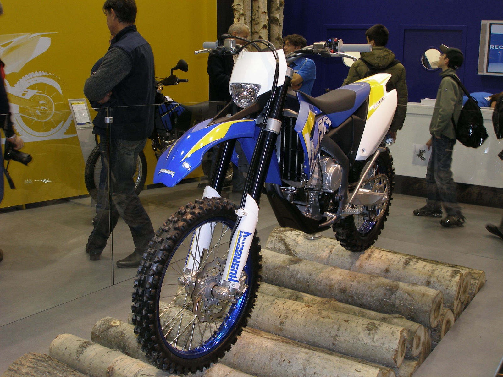 Husaberg FE 450 @ EICMA 2007